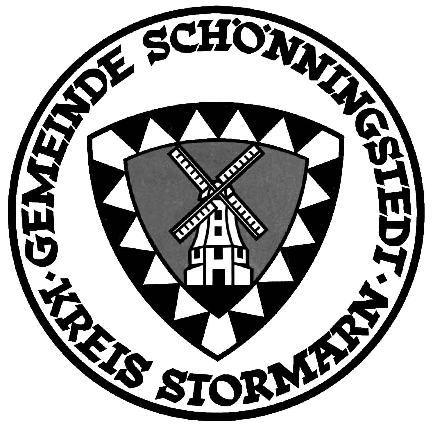 Wappen der bis 1974 selbständigen Gemeinde Schönningstedt